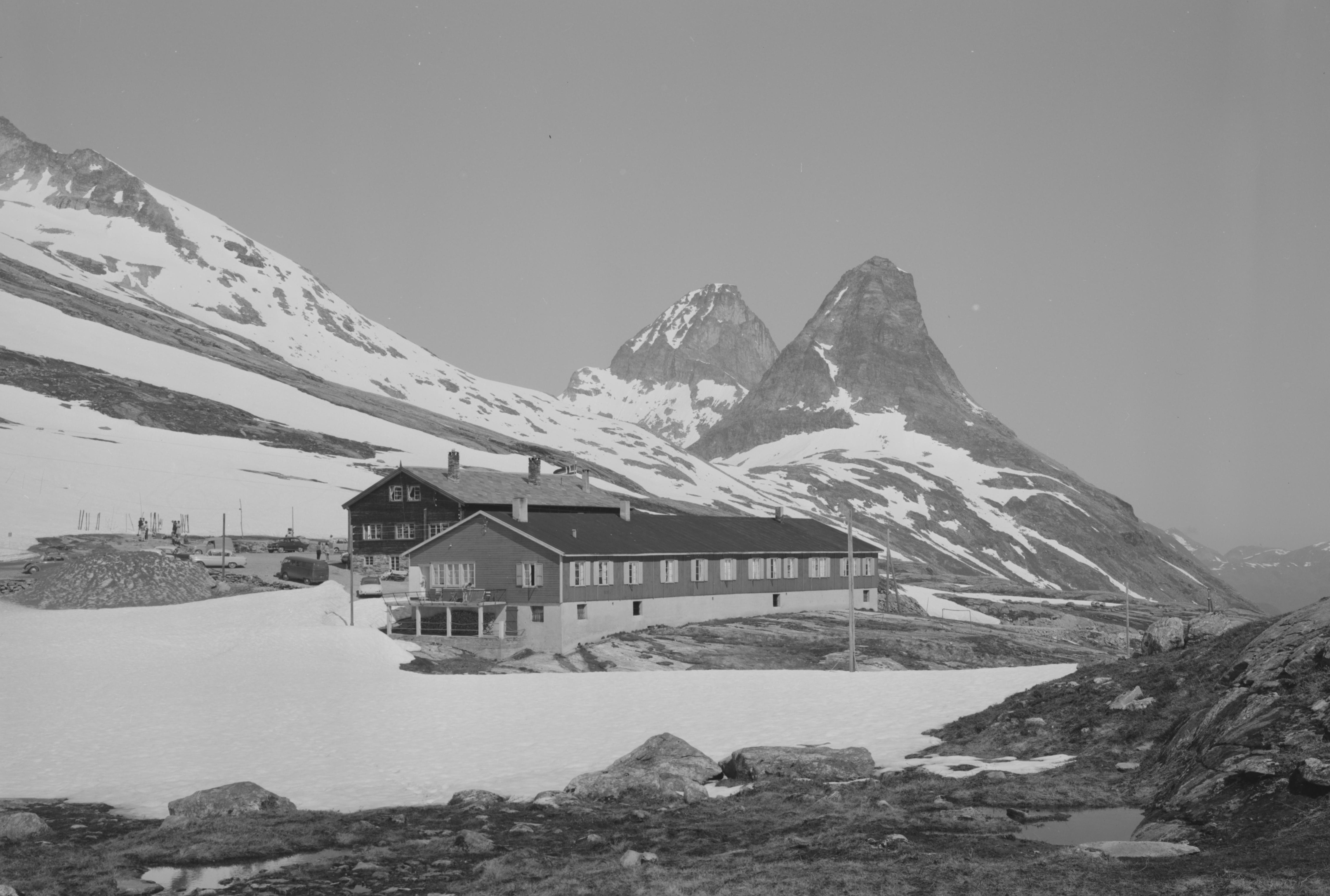 Bildet er hentet fra Nasjonalbibliotekets bildesamling. Anmerkninger til bildet var: fotograf: Å.M. Trollstigheimen, Rauma, Møre og Romsdal